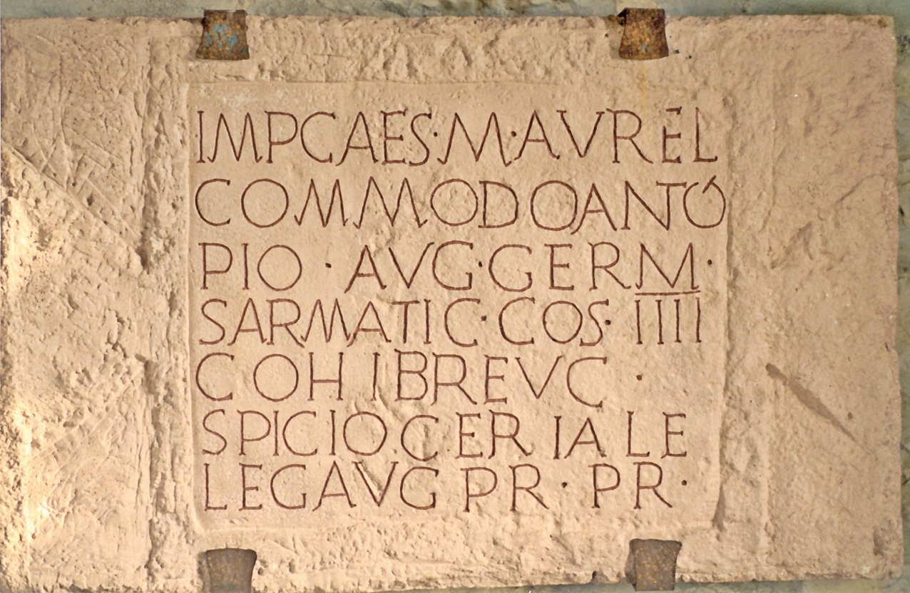 Abguss und Rekonstruktion der Bauinschrift (CIL 03, 11933) aus dem Kastell Pfünz (Castra Vetoniana), Bayern. Sie stammt aus den Jahren 183/184 und berichtet von Bauarbeiten am Kastell. In der Vergangenheit hat man diese Inschrift vielfach mit der Beseitigung von Schäden aus der Zeit der Markomannenkriege (166–180) in Verbindung gebracht. Übersetzung: Für Kaiser Aurelius Commodus Antoninus Pius Augustus, dem Sieger über Germanen und Sarmaten, im vierten Konsulat. Die 1. Kohorte der Breuker unter Spicius Cerialis, kaiserlicher Statthalter im Rang eines Praetors. Das Original dieser Inschrift befindet sich heute im Museum für Ur- und Frühgeschichte Eichstätt.